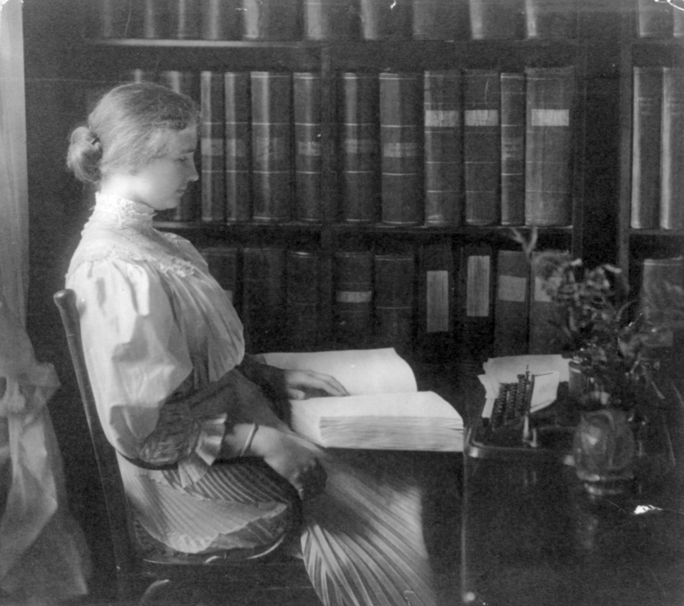 Helen Keller reading braille